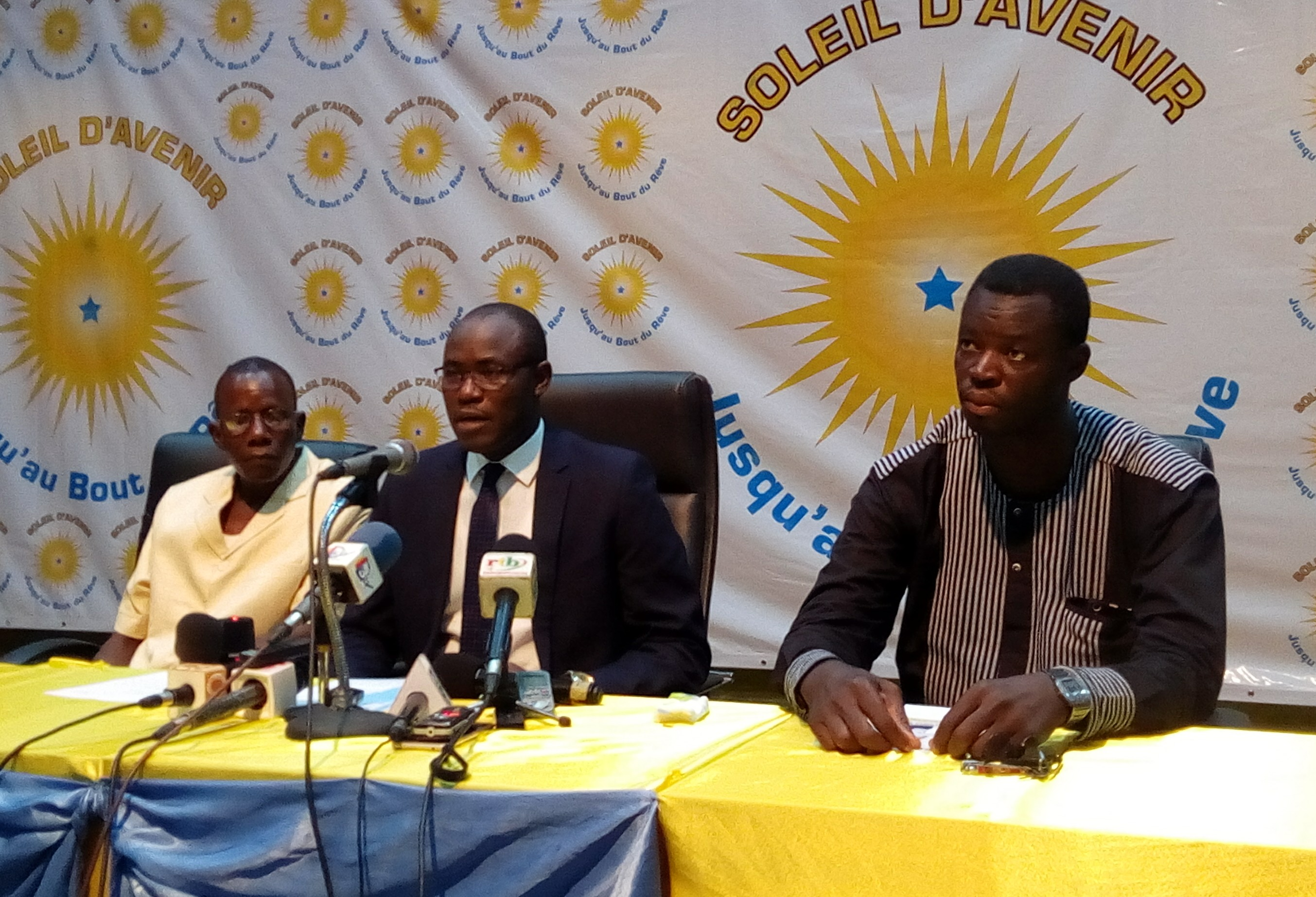 Photographie de Abdoulaye Soma en conférence de presse.